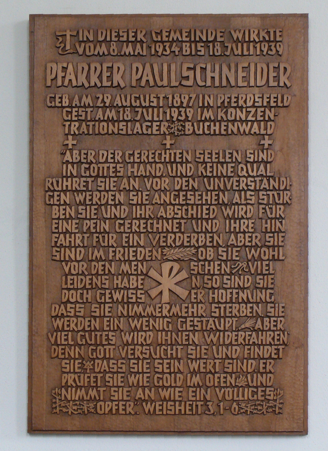 Gedenktafel für Pfarrer Paul Schneider in der Kirche von Womrath (Eine Identische befindet sich in der evangelischen Kirche von Dickenschied)